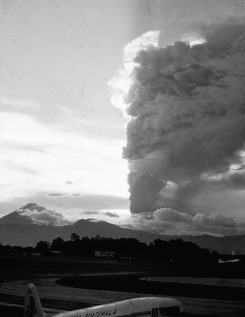 Erupción del Volcán de Fuego en la década de 1950, vista desde el Aeropuerto Internacional La Aurora.